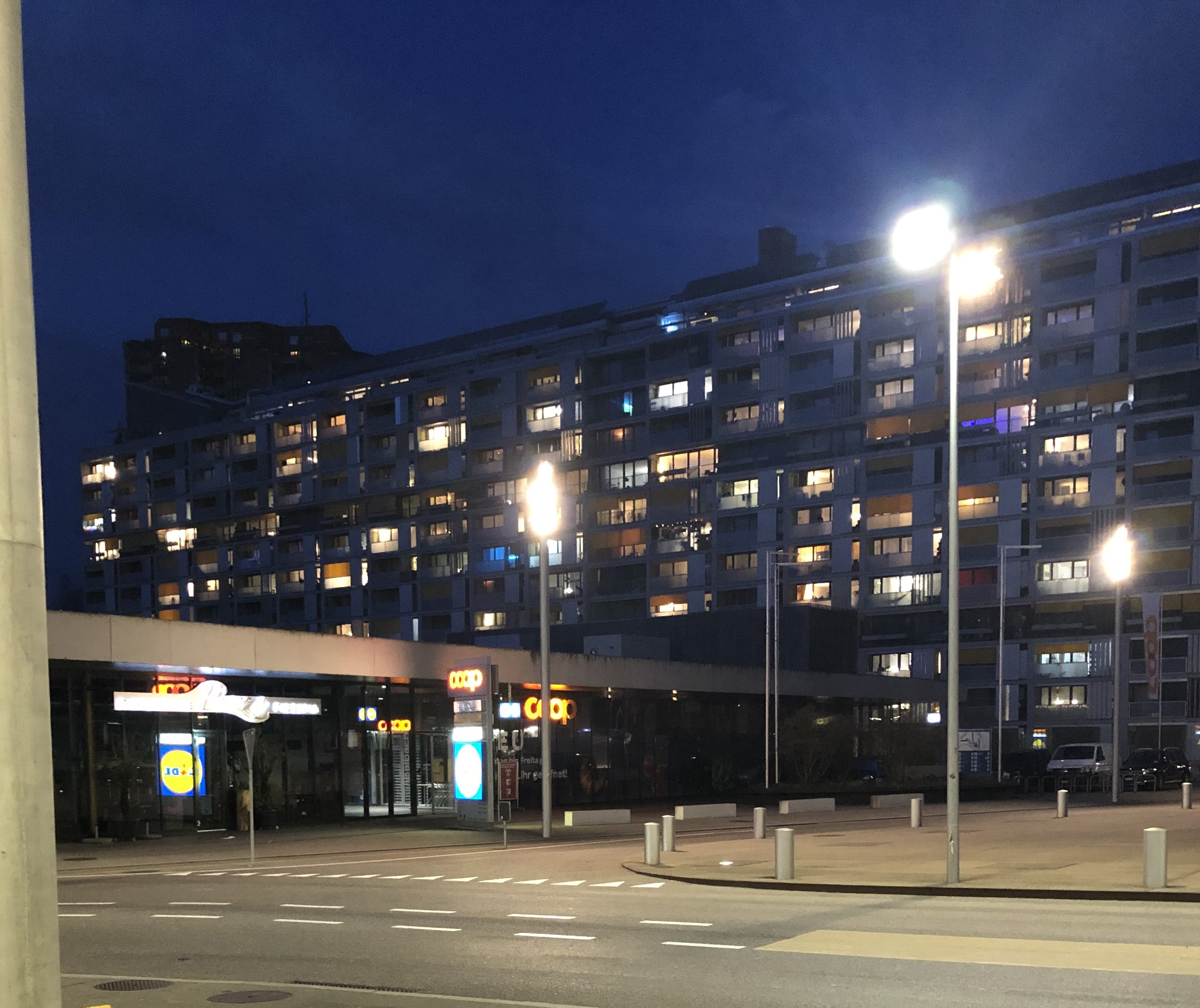 Blick auf die Plaza bei Nacht